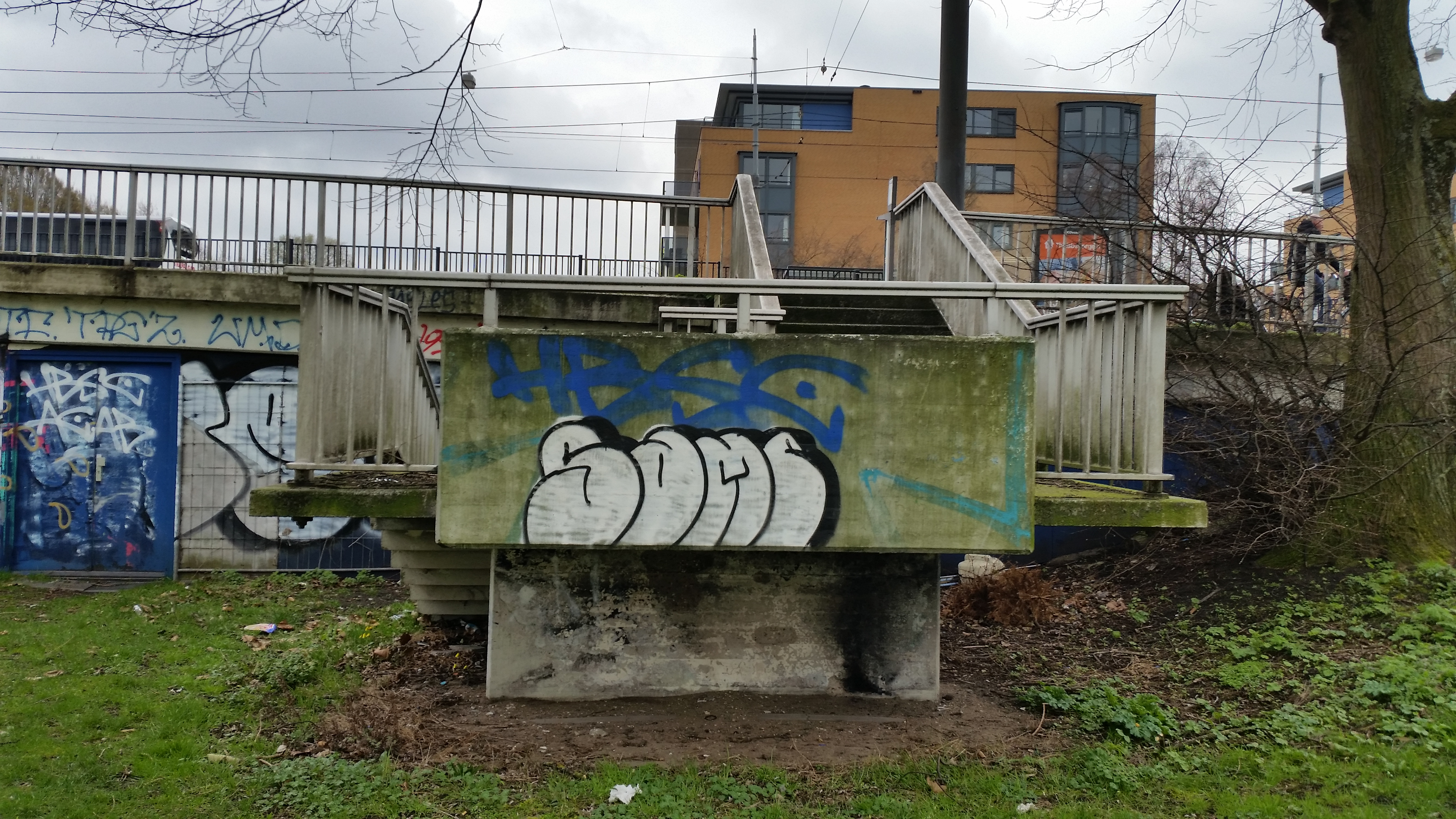 Trap vanaf Brug 385 (in Amsterdam) naar de voormalige speelplaats